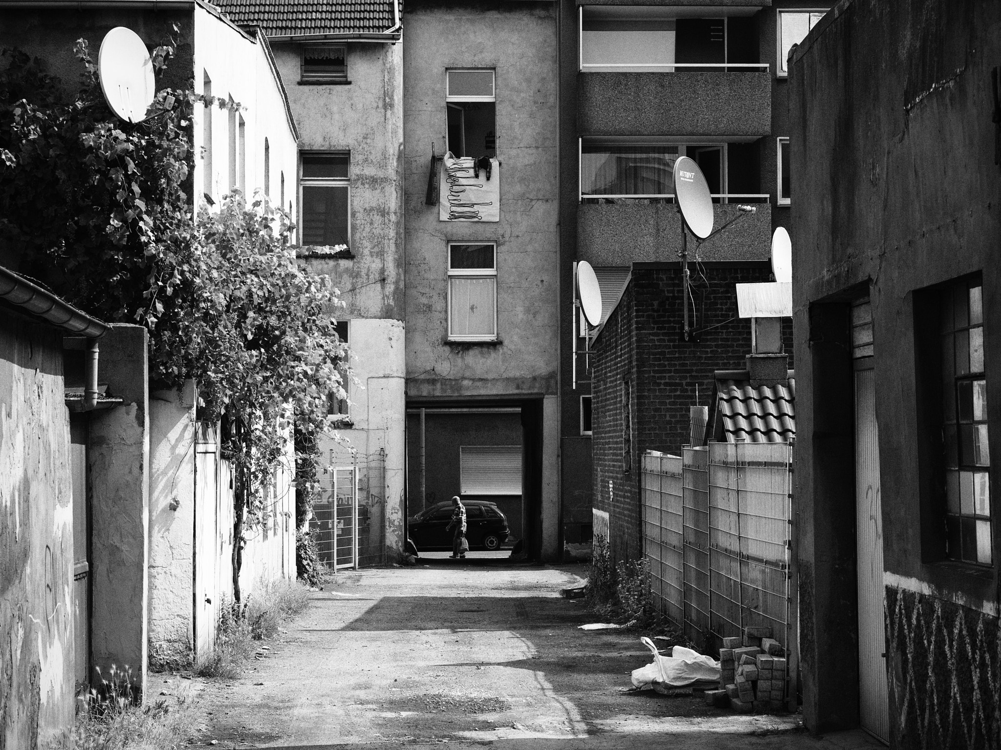 500px provided description: Germany, Duisburg, Marxloh [#B&W ,#Street Photography ,#Street ,#Noir et Blanc ,#Black and White ,#House ,#Monochrome ,#Building ,#Monochrom ,#Blanco y Negro ,#Balcony ,#Schwarz Weiss ,#Schwarzweiss ,#Streetfotografie ,#Technik ,#Technique ,#Haus ,#Backyard ,#Hinterhof ,#Balkon ,#Bianco e Nero ,#Satellite Dish ,#Geb?de ,#Schwarzwei? ,#Stra?nfotografie ,#Duisburg Juli 2013 ,#Satellitensch?sel]